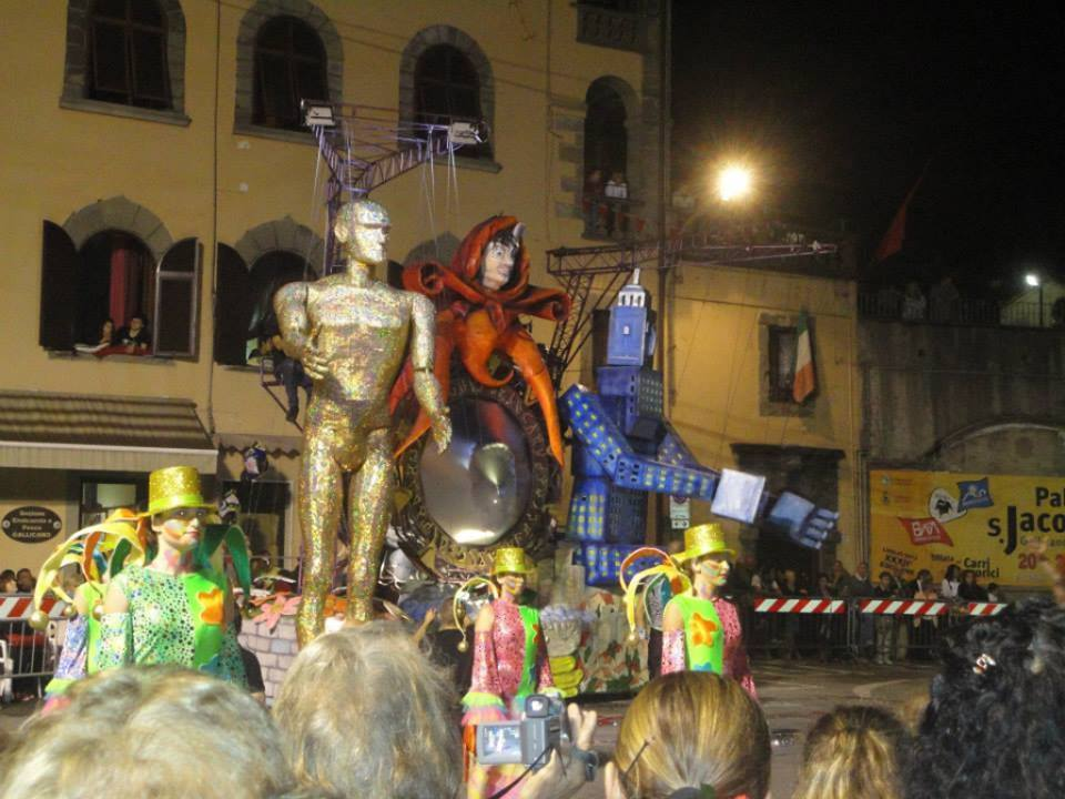 Uno dei carri più belli (Borgo antico 2013)